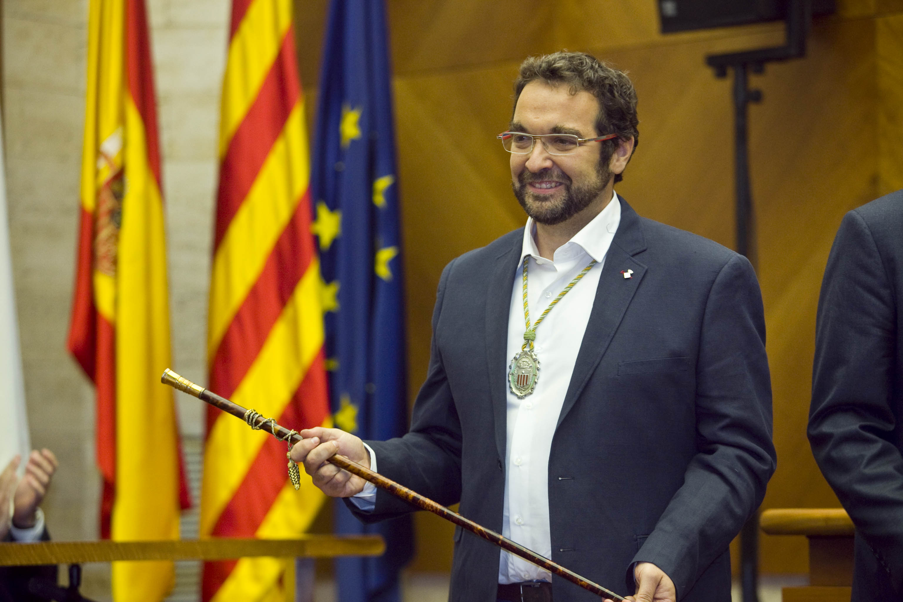 Juli Fernàndez i Olivares prenent la vara d'alcalde